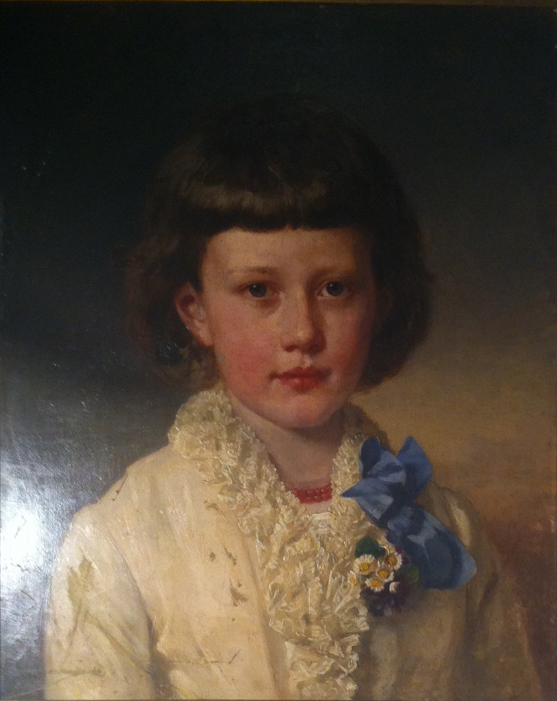 Otto Rethel, Porträt Elisabeth Poensgen, verh. von Witzleben Düsseldorf, 1881